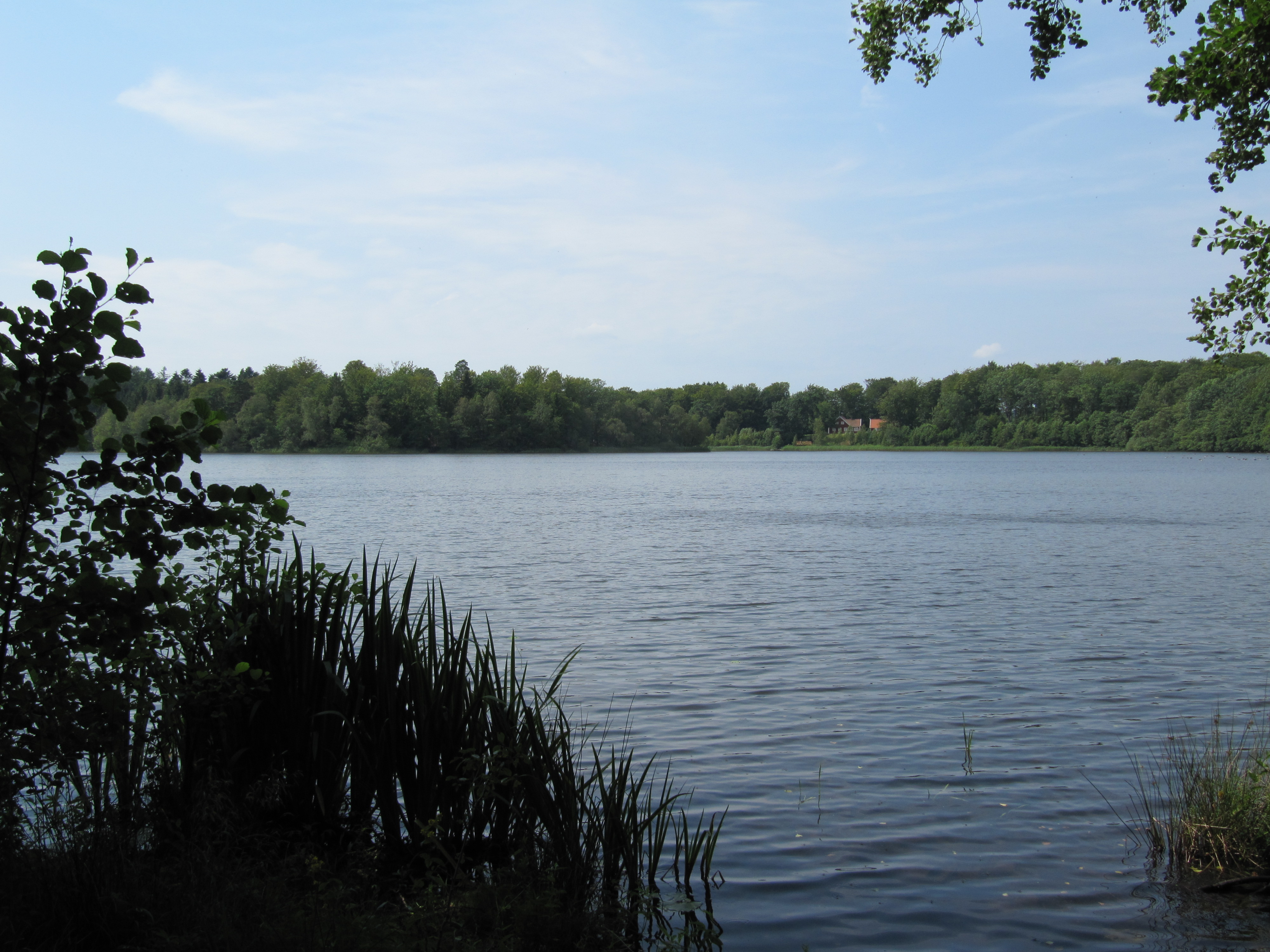 Östra änden av Kyrkesjön nära Tåssjö kyrka.